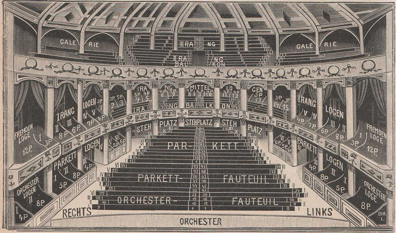 Rudolph Hertzog, Agenda 1912. Jahreskalender des Berliner Kaufhauses. Seite 99. Berliner Theater in Berlin SW, Charlottenstraße 90-92 Leinen, 224 Seiten, 19,5 x 28,5 cm